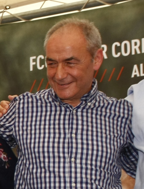 Visita a la Feria de San Isidro de Talavera de la Reina